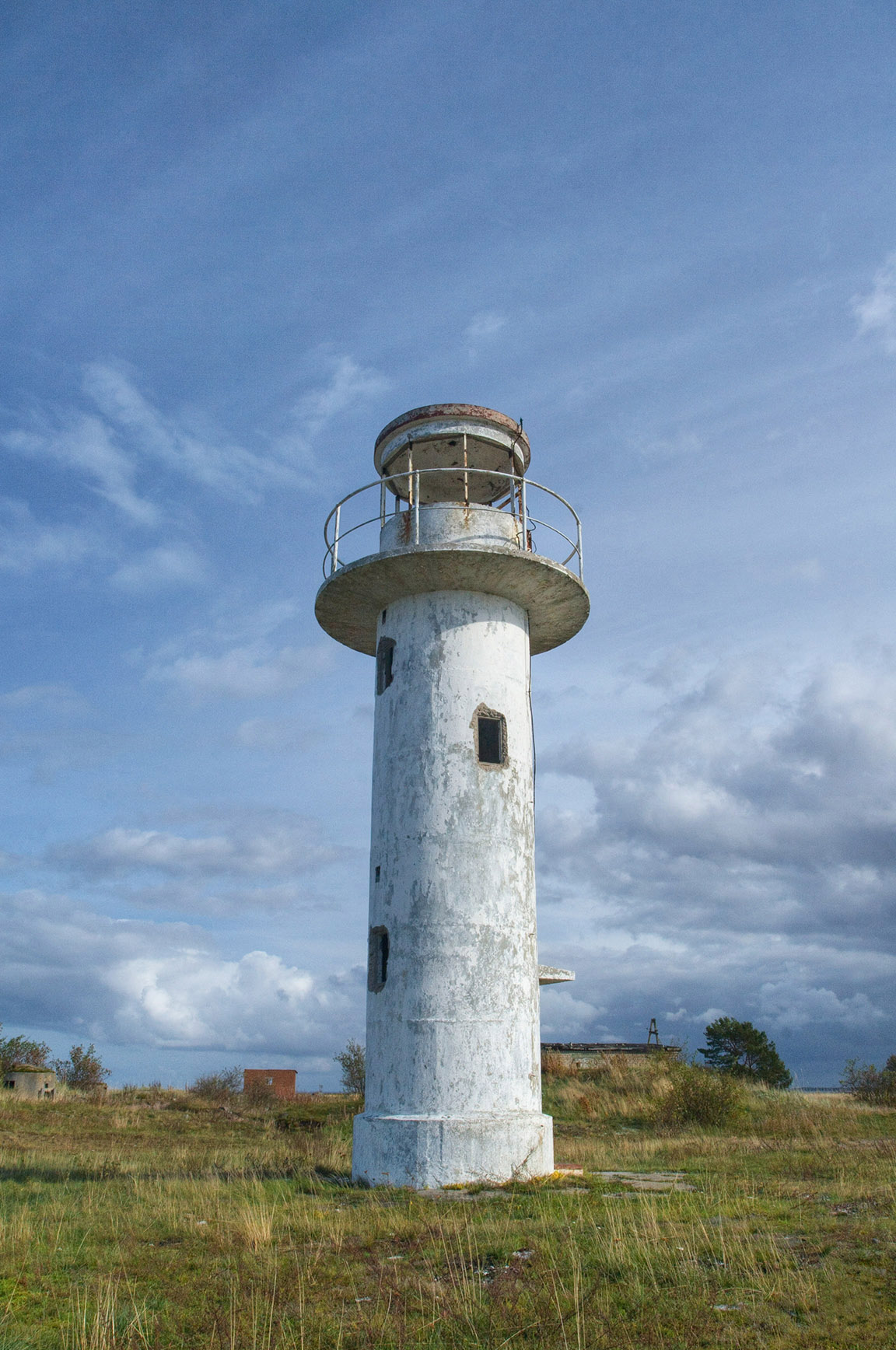 Uitru sääre tuletorn Ihasalu poolsaarel